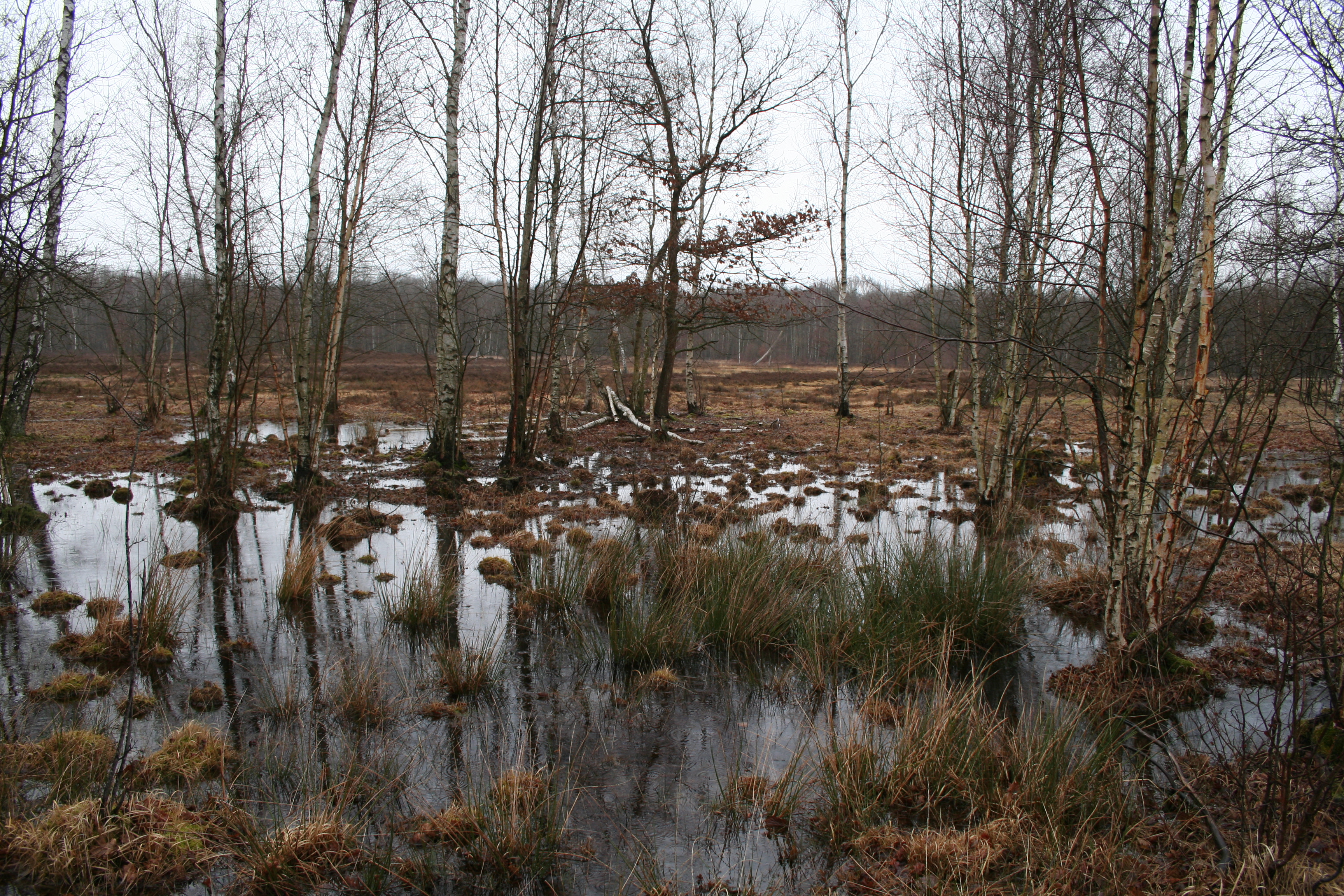 Réserve naturelle nationale des landes de Versigny